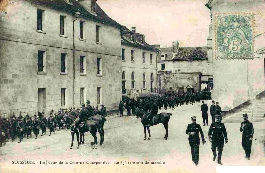 fantassins du 67e R.I .